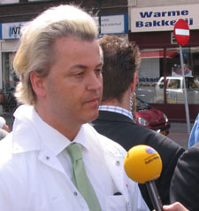 Geert Wilders, zelf genomen foto